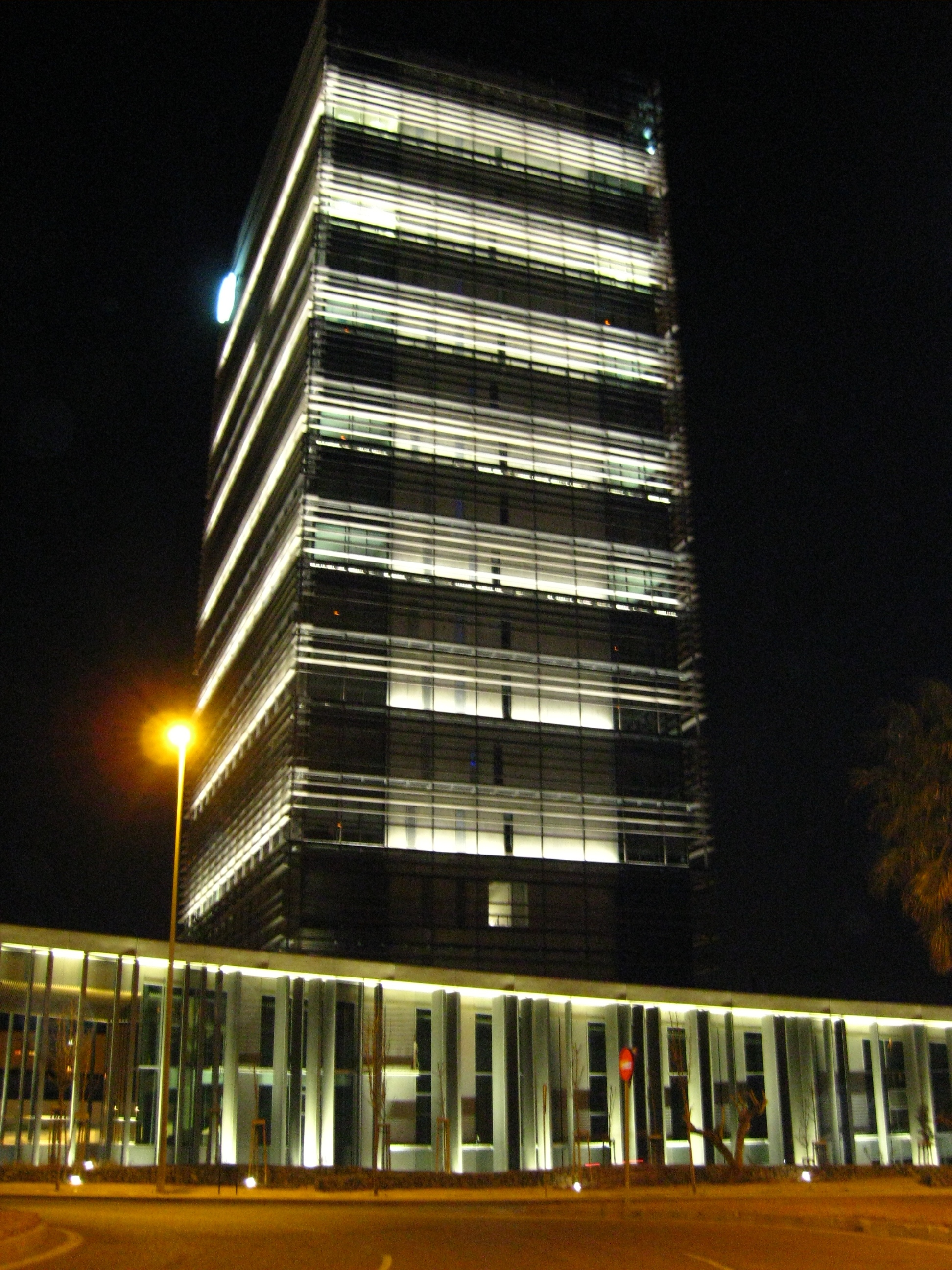 Torre Caja Badajoz. Marzo de 2012